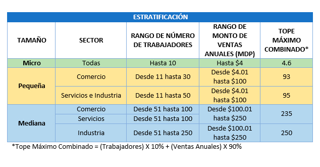 Estratificación Económica de las Empresas Según la Secretaría de Economía (SE) de México